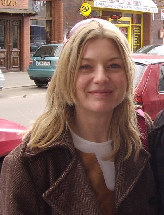 Edyta Olszówka (ur. 15 grudnia 1971 w Lubinie) - polska aktorka filmowa i teatralna.